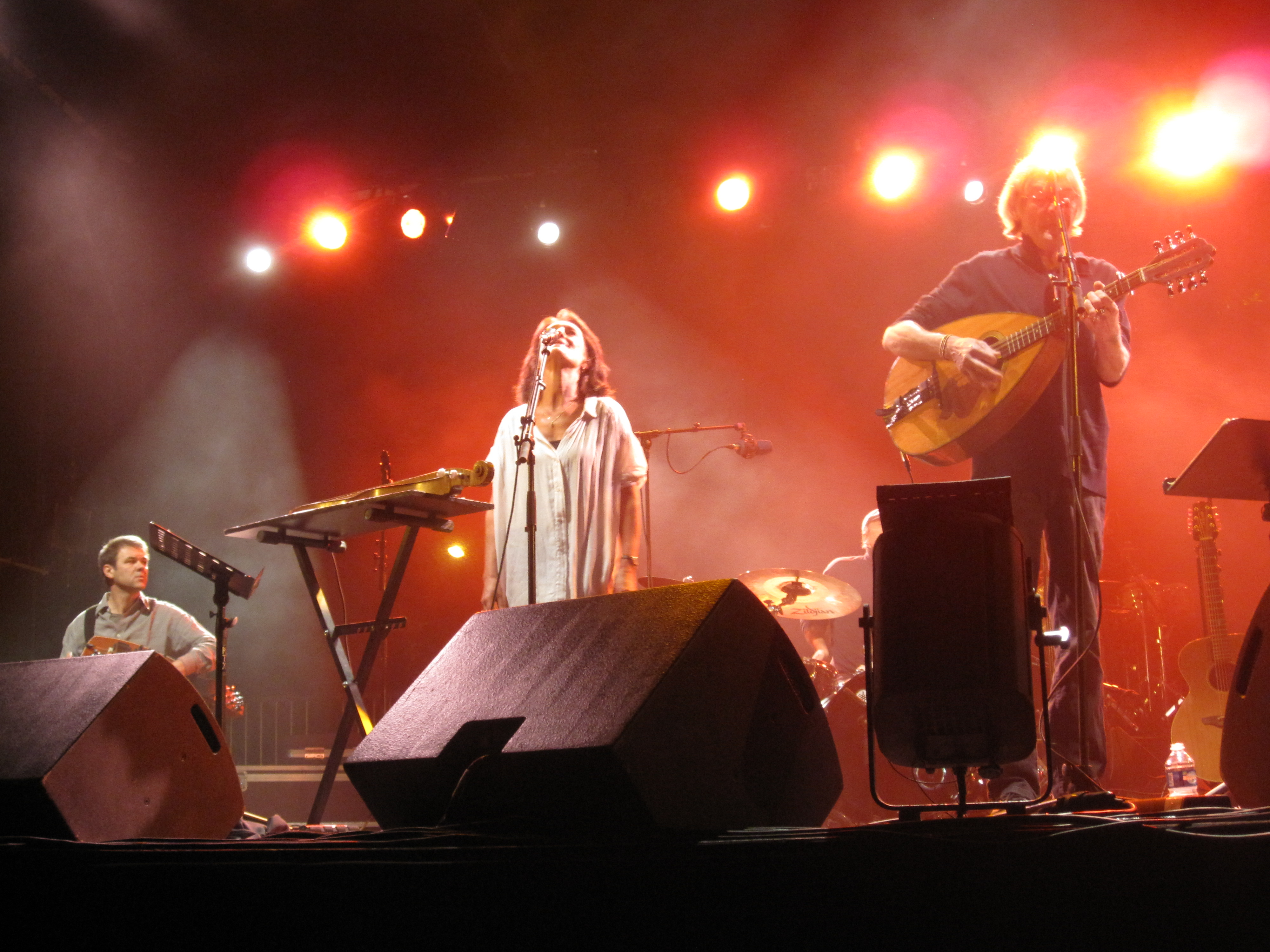 Malicorne le 14/09/2012 à Château-Thierry